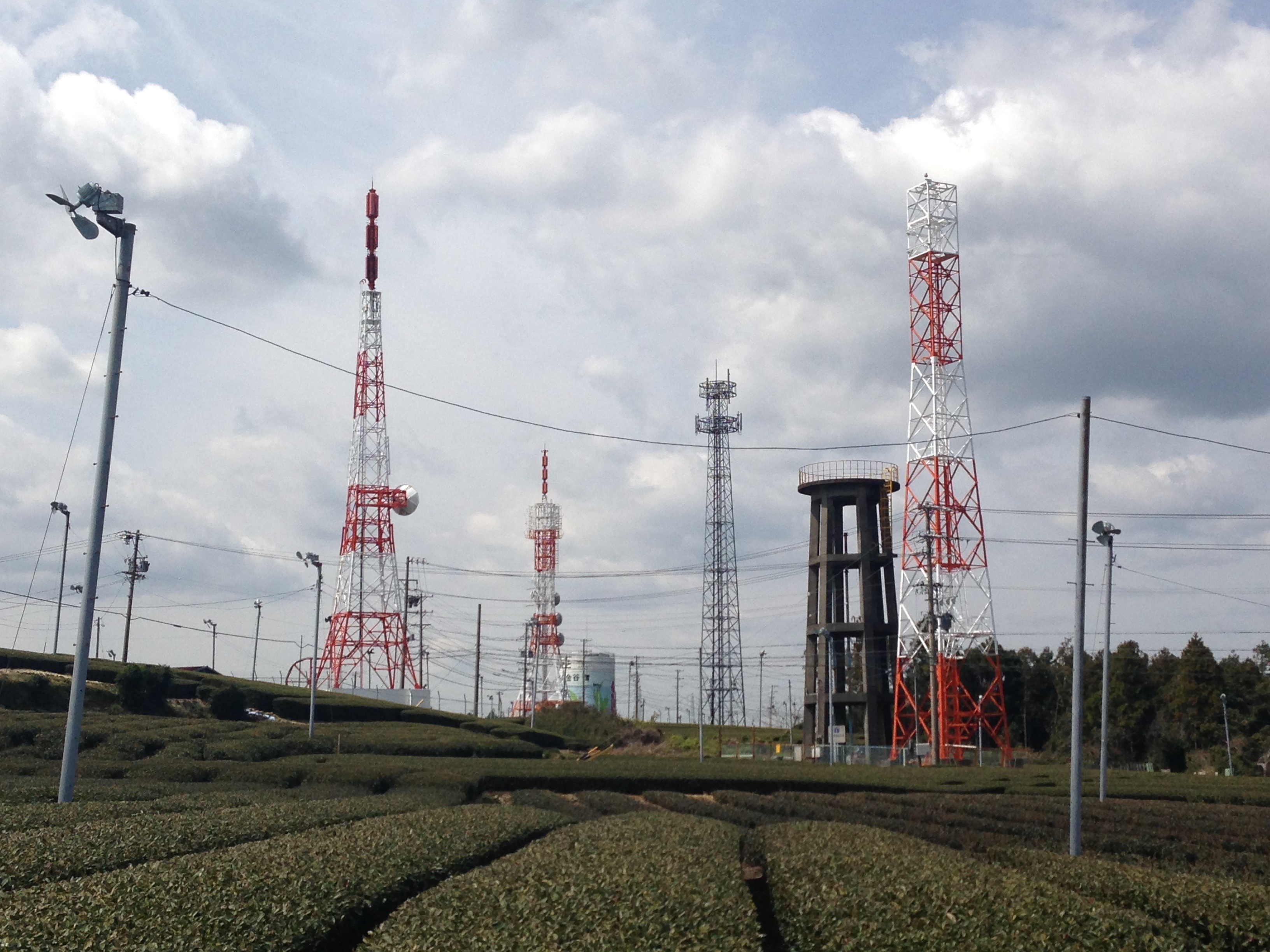 島田中継局の鉄塔群。西向きに撮影。SBSの鉄塔は映っていない。